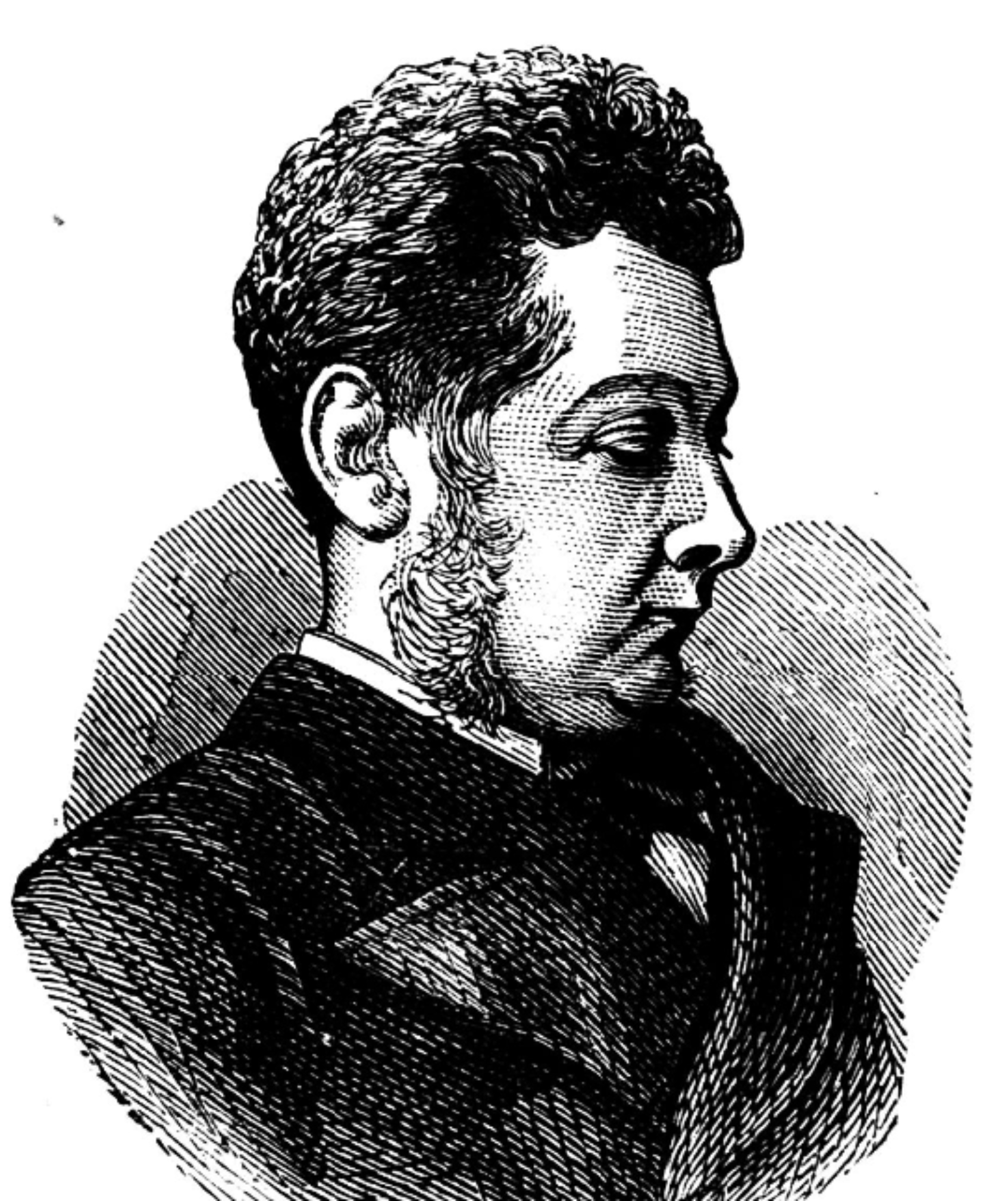 C J Watkin Williams AS Dinbych